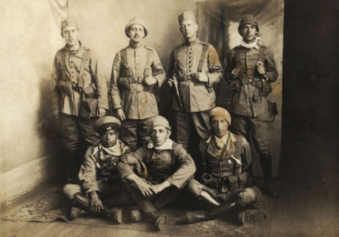 Cena da Revolução Constitucionalista de 1932, soldados paulistas fotografados por Claro Jansson em Itararé/SP. Em pé, da esquerda para a direita, os integrantes identificados do "Batalhão 14 de julho": Aureo de Almeida Camargo, Felício Cintra Prado, Alonso Ferreira Camargo e José Ignácio Lobo. Data provável: 16 ou 17 de julho de 1932. Obs: O combatente Alonso morreu em 30 de agosto de 1932, após ter sido ferido por estilhaços de granada nos combates de 23 de agosto em Buri/SP.